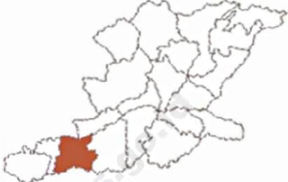 Peta Mandiraja